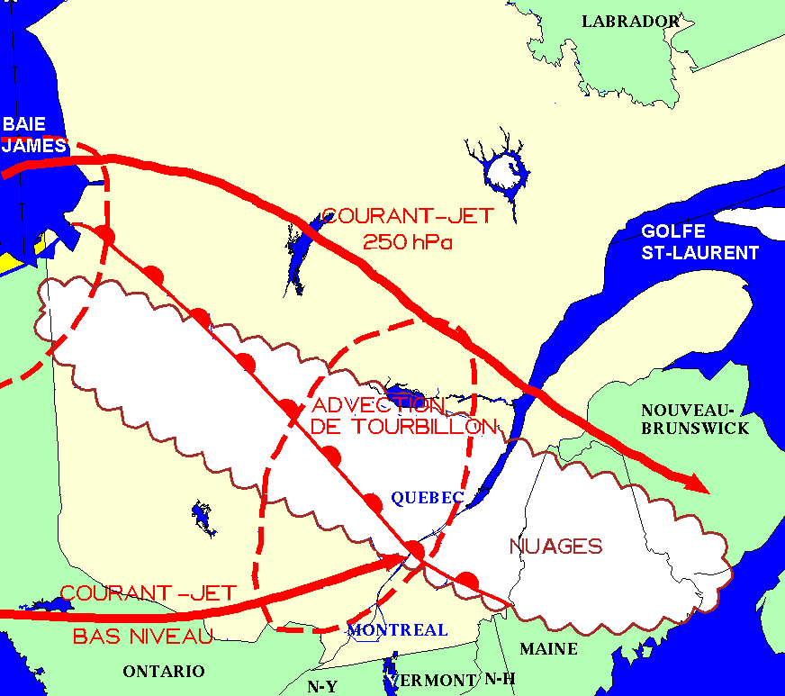 Schéma montrant les différents éléments dynamique qui ont favorisés le développement d'orages violents sur le centre du Québec lors de la tornade de Maskinongé le 27 août 1991. On retrouve un front chaud s'étendant de la baie James vers le Maine. Dans le secteur chaud les nuages se sont dissipés et on peut voir un courant-jet de bas niveau.